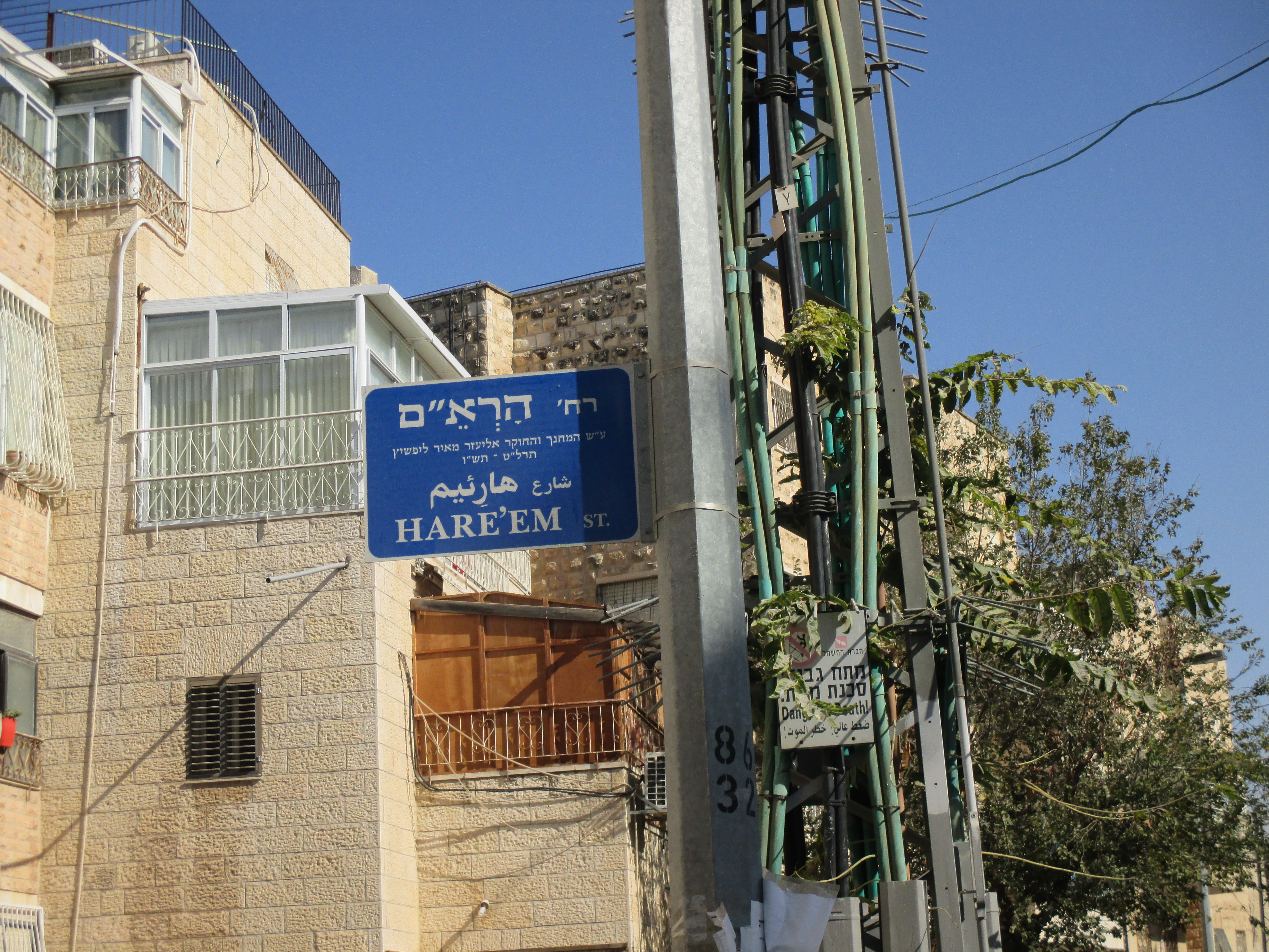 שלט רחוב הראם בשכונת סנהדריה בירושלים